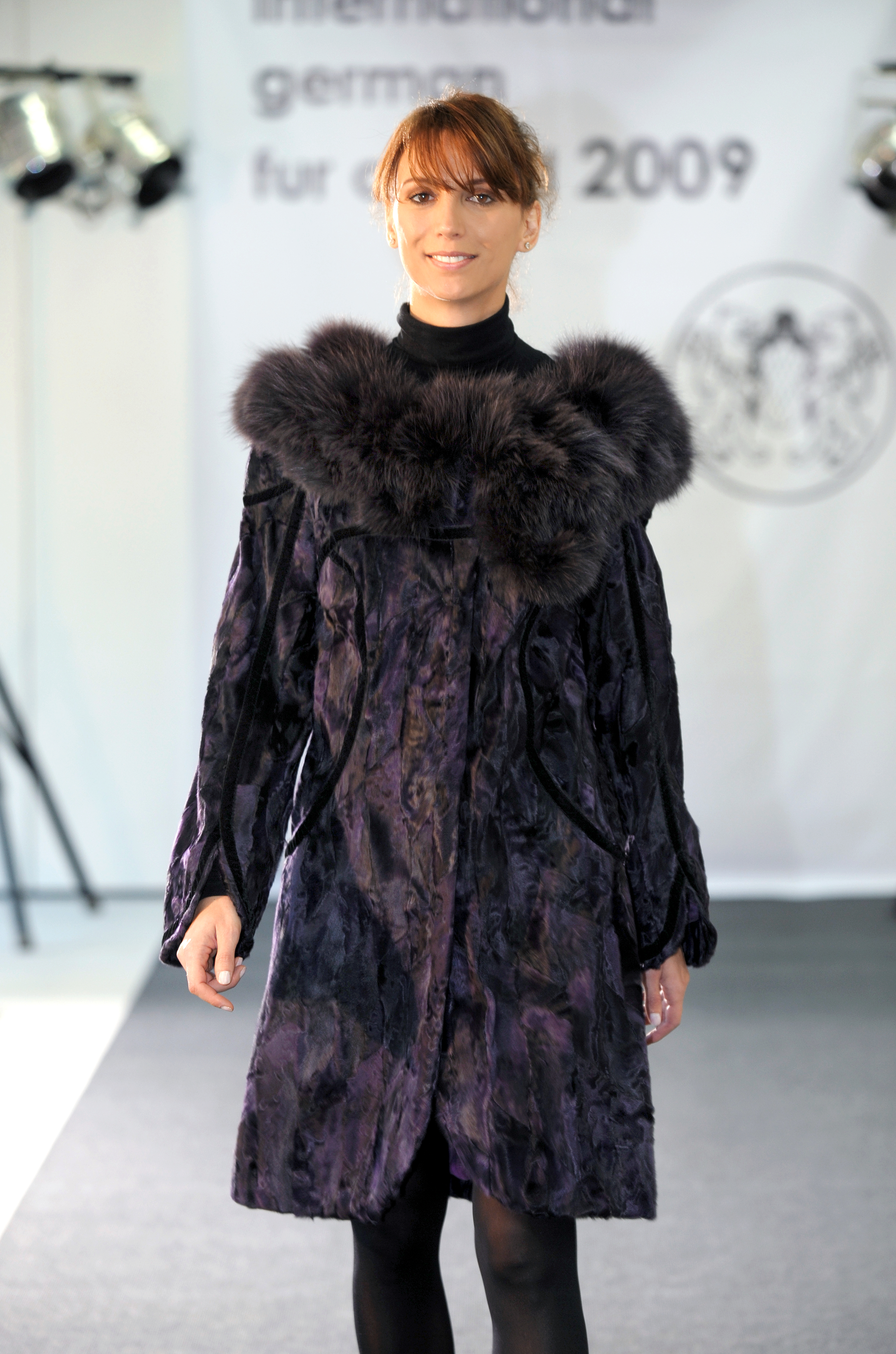 International German Fur Award 2009 des Kürschnerhandwerks.